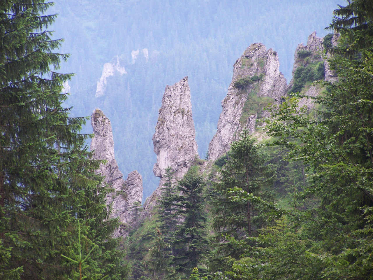 Dolina Strążyska